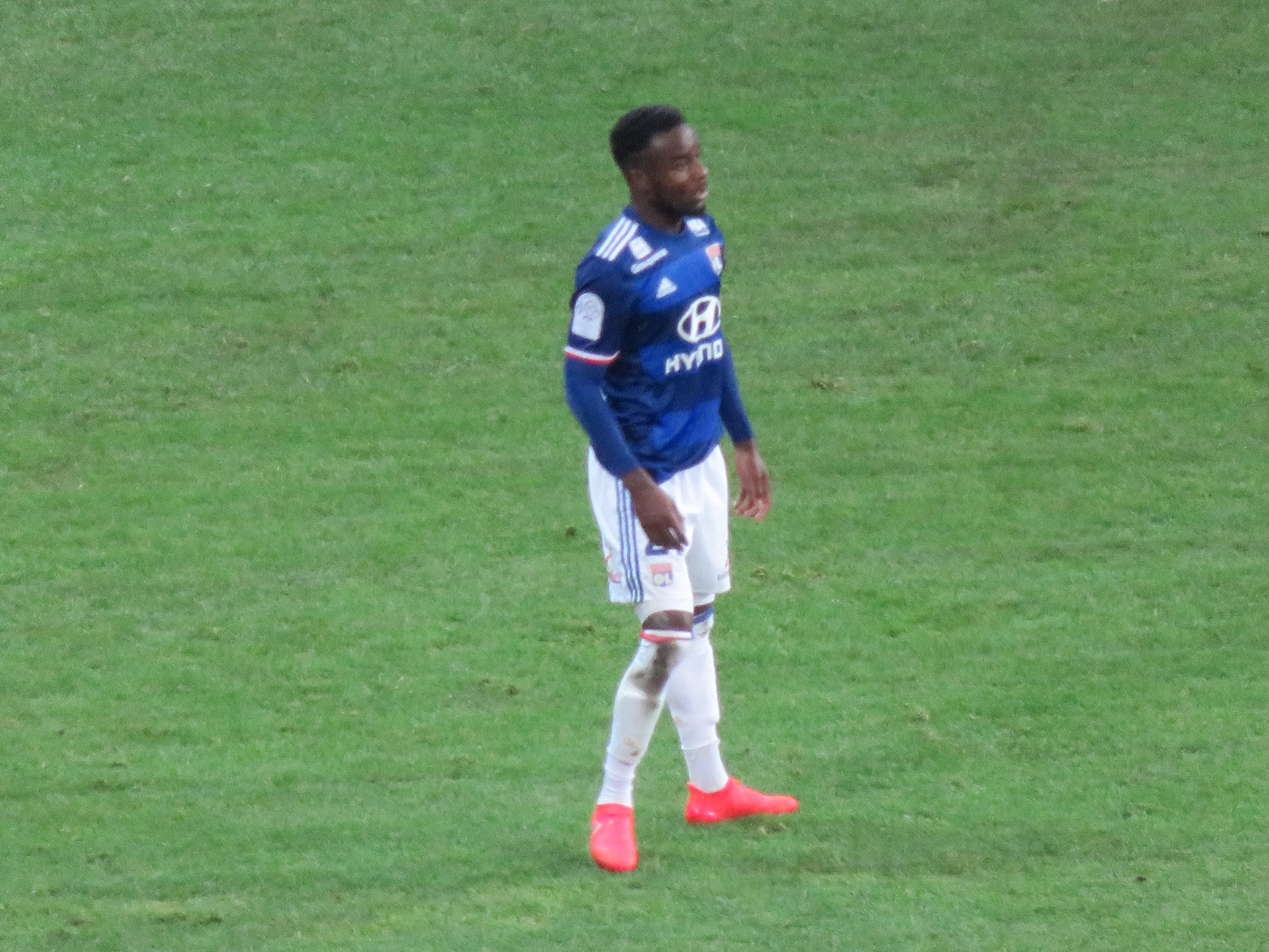 Maxwel Cornet lors de la deuxième mi-temps du match entre Lille et Lyon le 18 novembre 2016